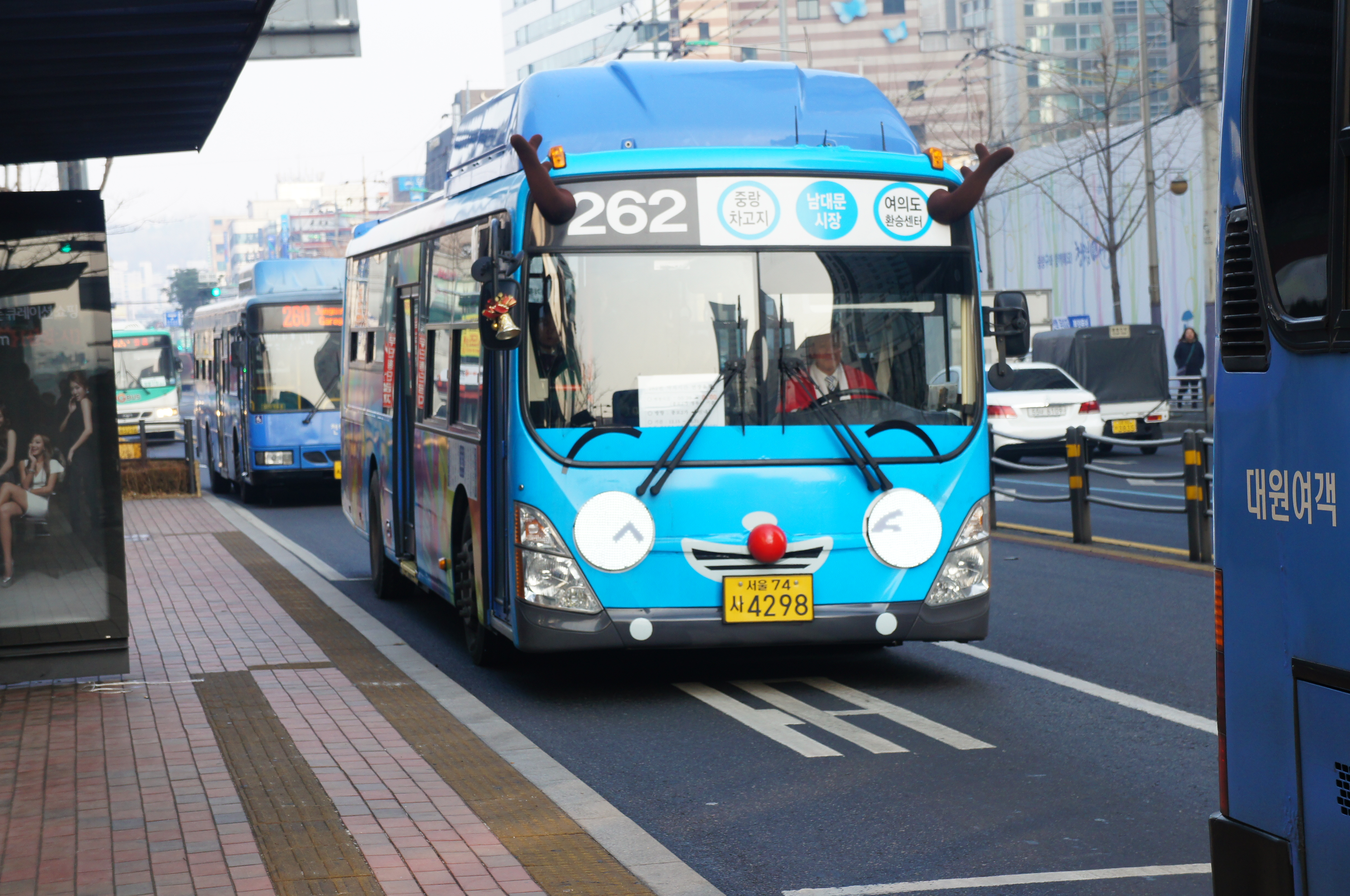 262번 루돌프 타요 버스